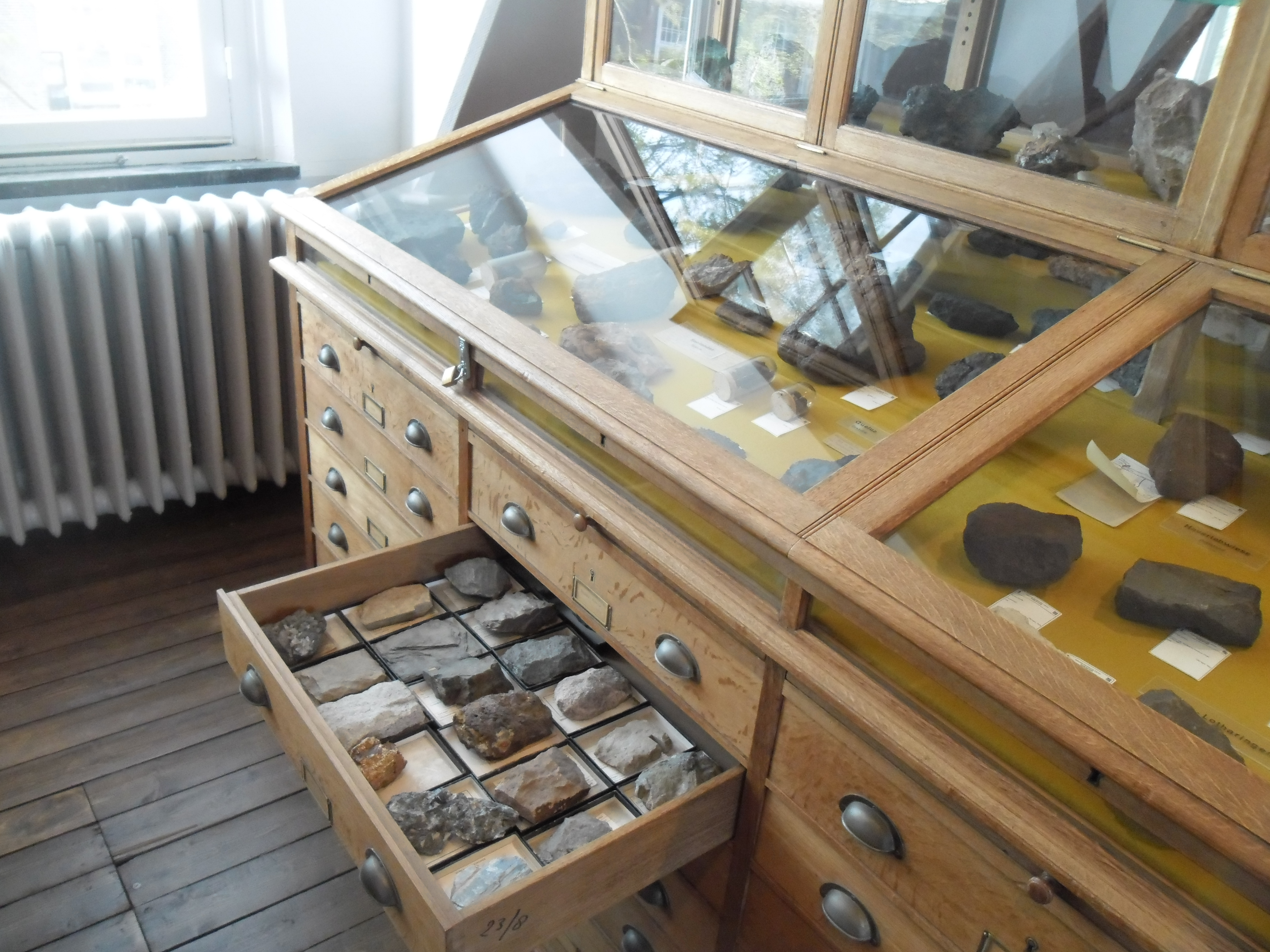 Vitrinekast in het gerenoveerde Mineralogisch-Geologisch Museum in Delft